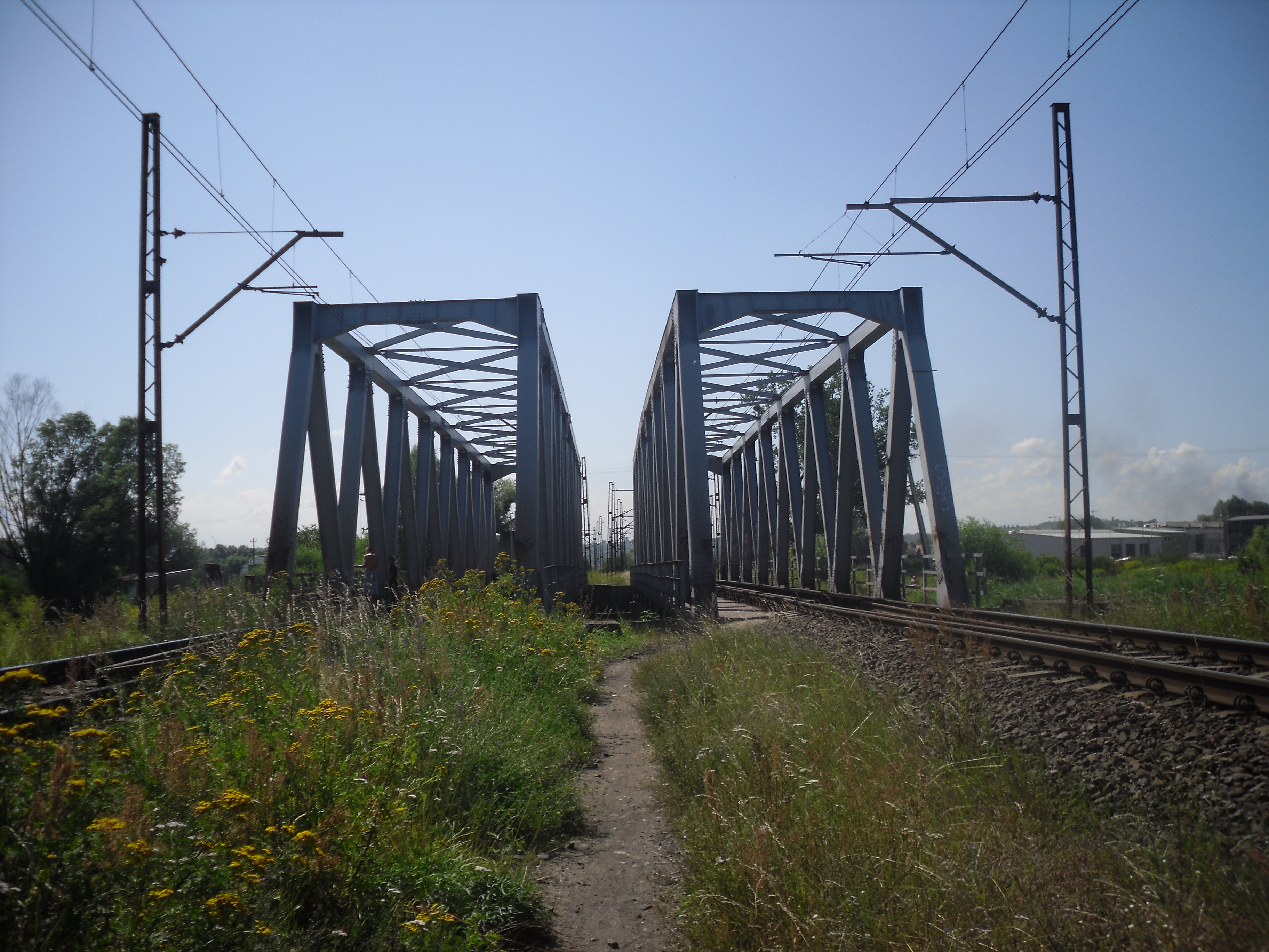 Gdańsk. Mosty kolejowe na Motławie.